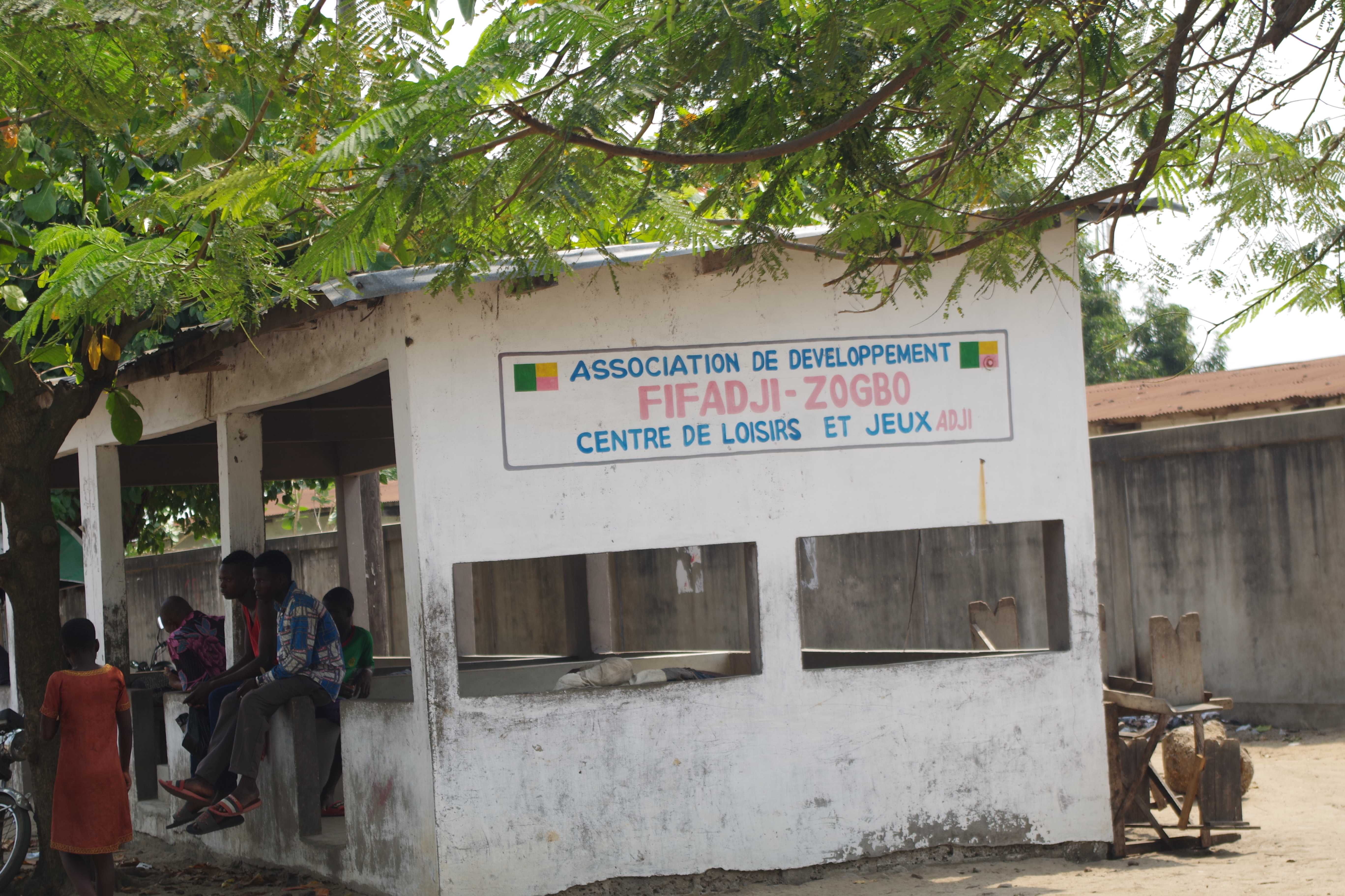 Centre Jeu traditionnel ADJI awalé (domino) situé à Fifadji un quartier de Cotonou au Bénin